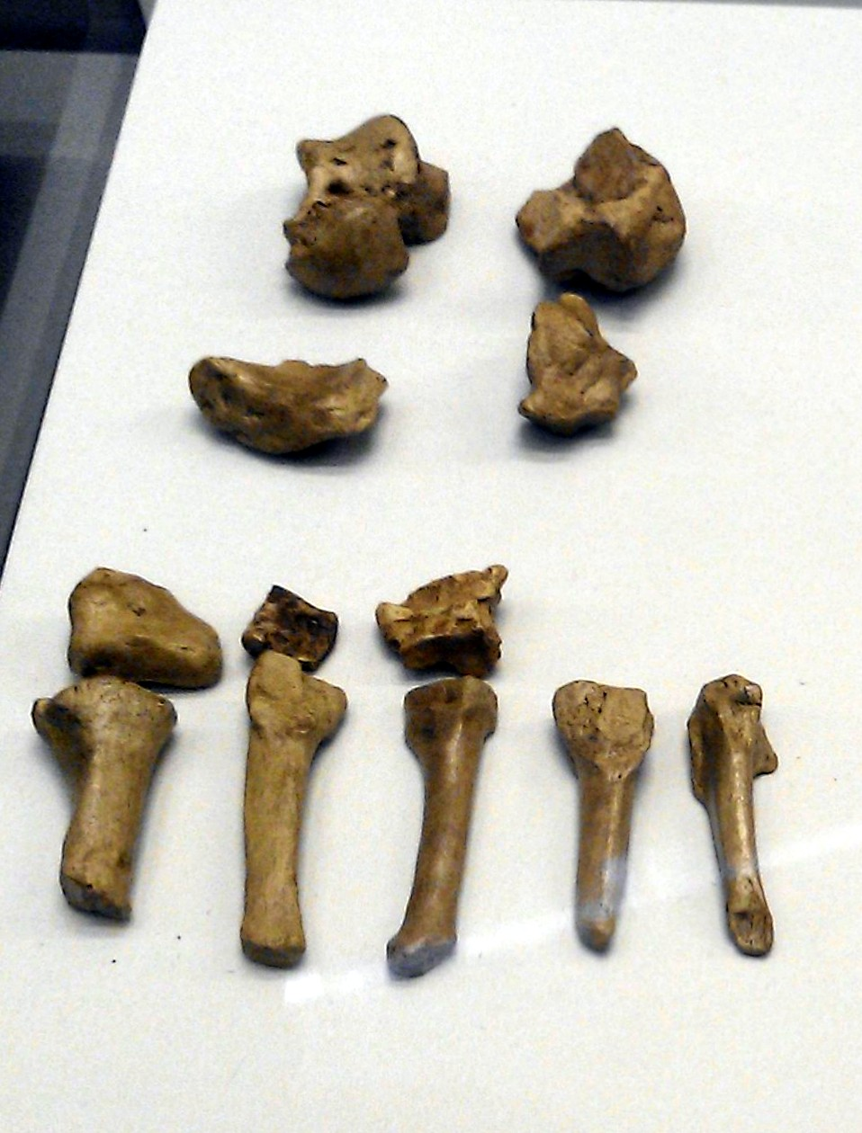 Pie de Homo habilis, OH 8. Réplica Original: FLK N, Garganta de Olduvai (Tanzania) 1,75 millones de años Museo Nacional de Dar Es Salaam, Tanzania Réplica: Instituto de Evolución en África Exhibido en exposición temporal, "La cuna de la humanidad", en el Museo Arqueológico de Regional de Madrid